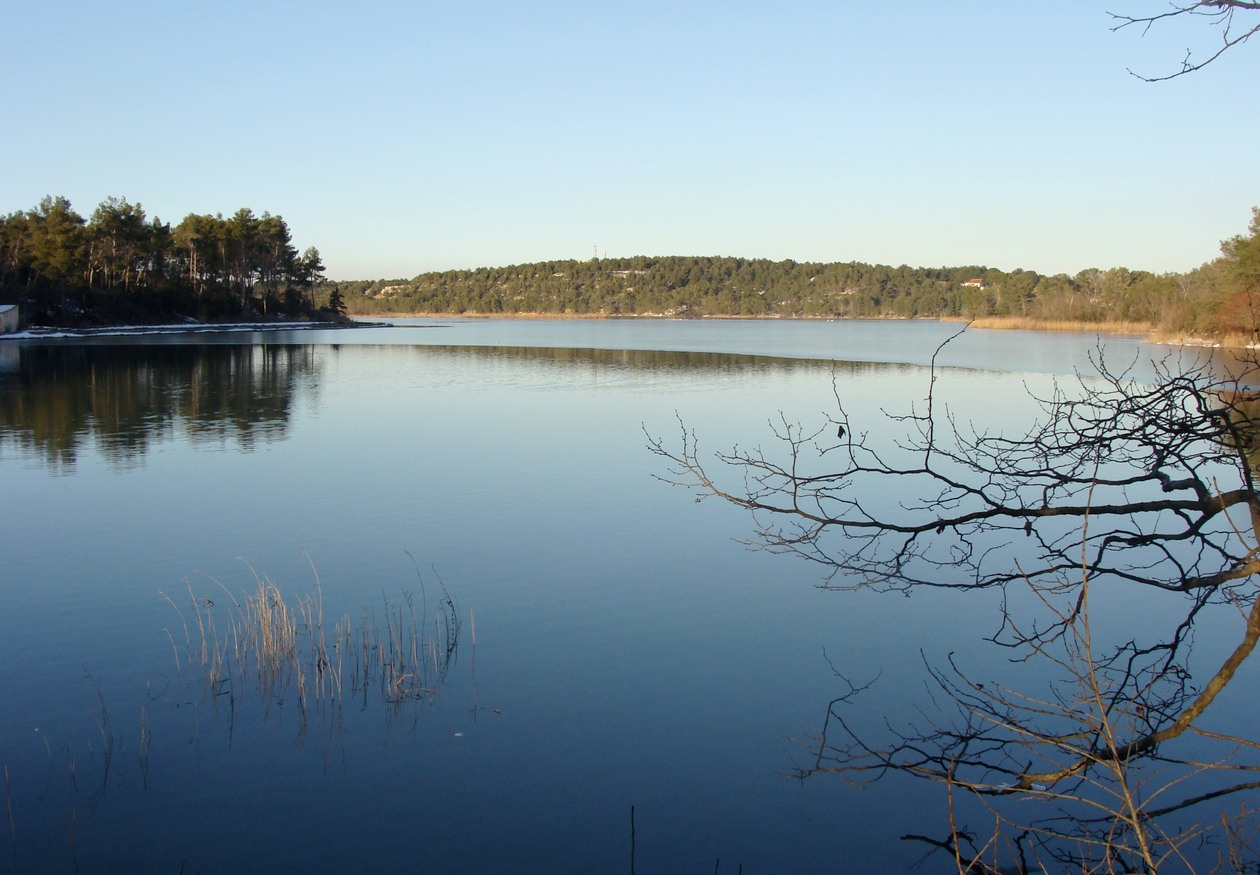 Le bassin du Réaltor, grand réservoir situé sur le cours du canal de Marseille, à Calas, commune de Cabriès.